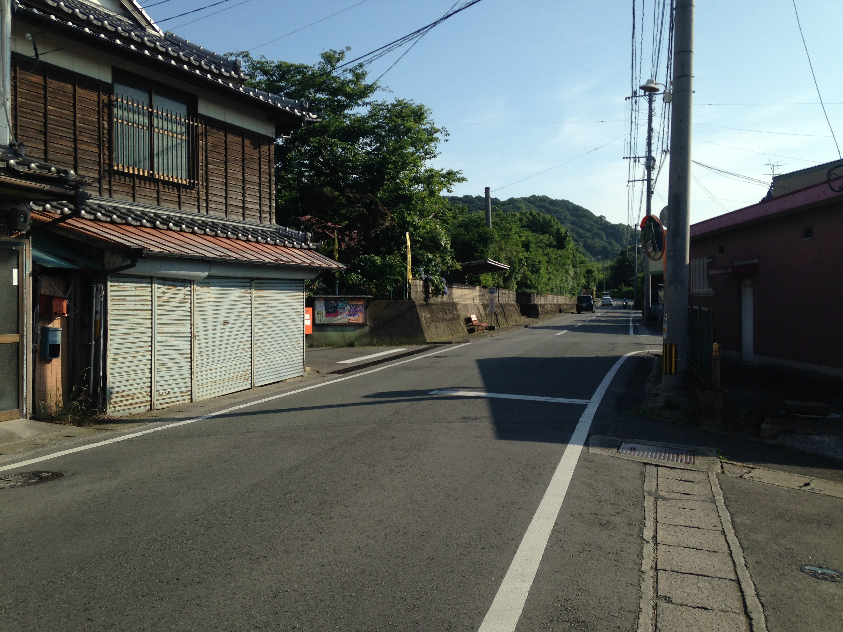 熊本県道29号(熊本県荒尾市原万田)